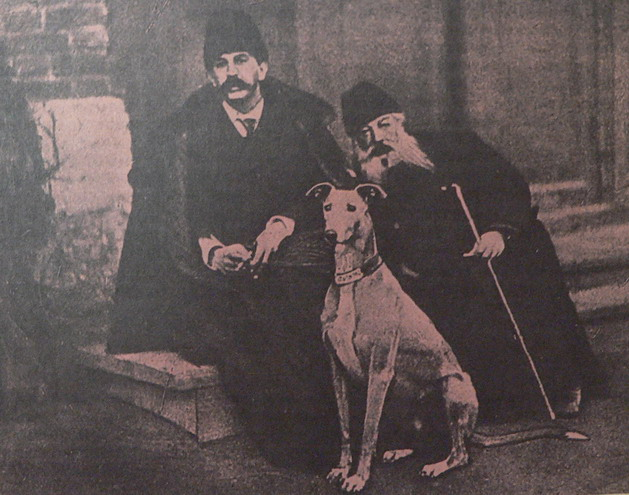 Василий Алексеевич Шереметев (1834-1884) и граф В. Гудович с английской борзой по имени Мальчик